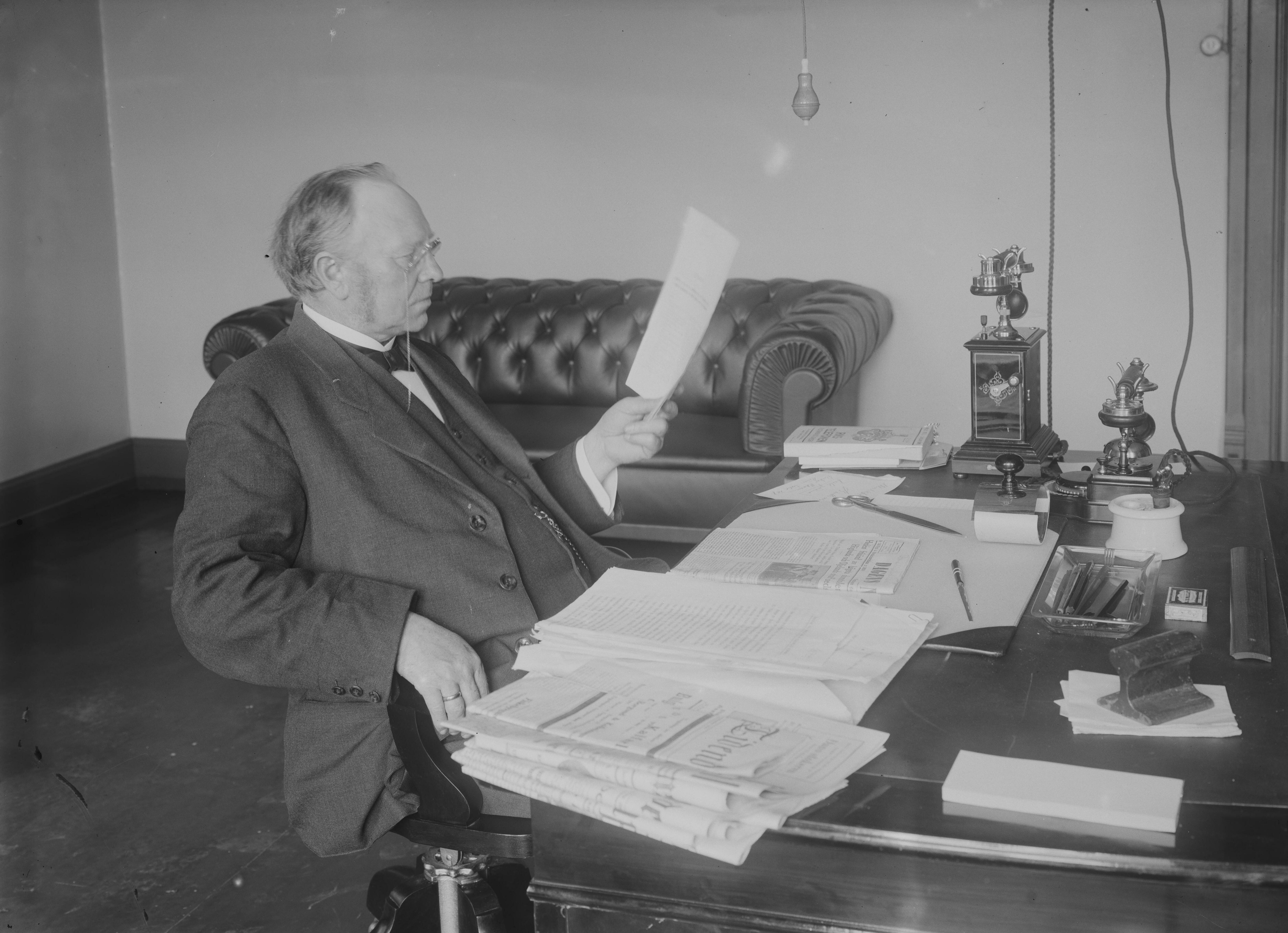 Bildet er hentet fra Nasjonalbibliotekets bildesamling. Anmerkninger til bildet var: Påskrift arkivark: Statsraad Vik Arkivnummer: 214